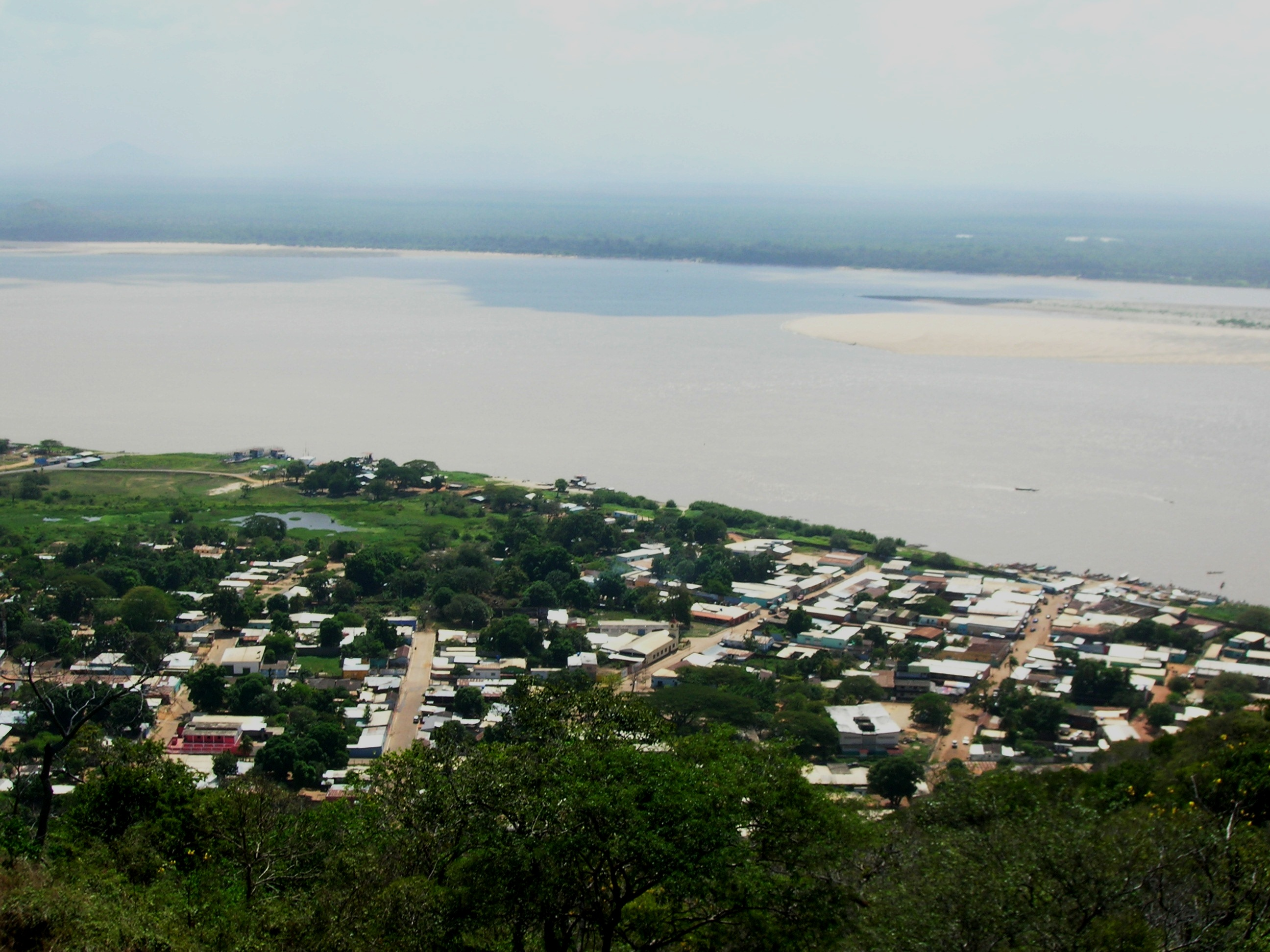 El pueblo de Cabruta visto desde el cerro.